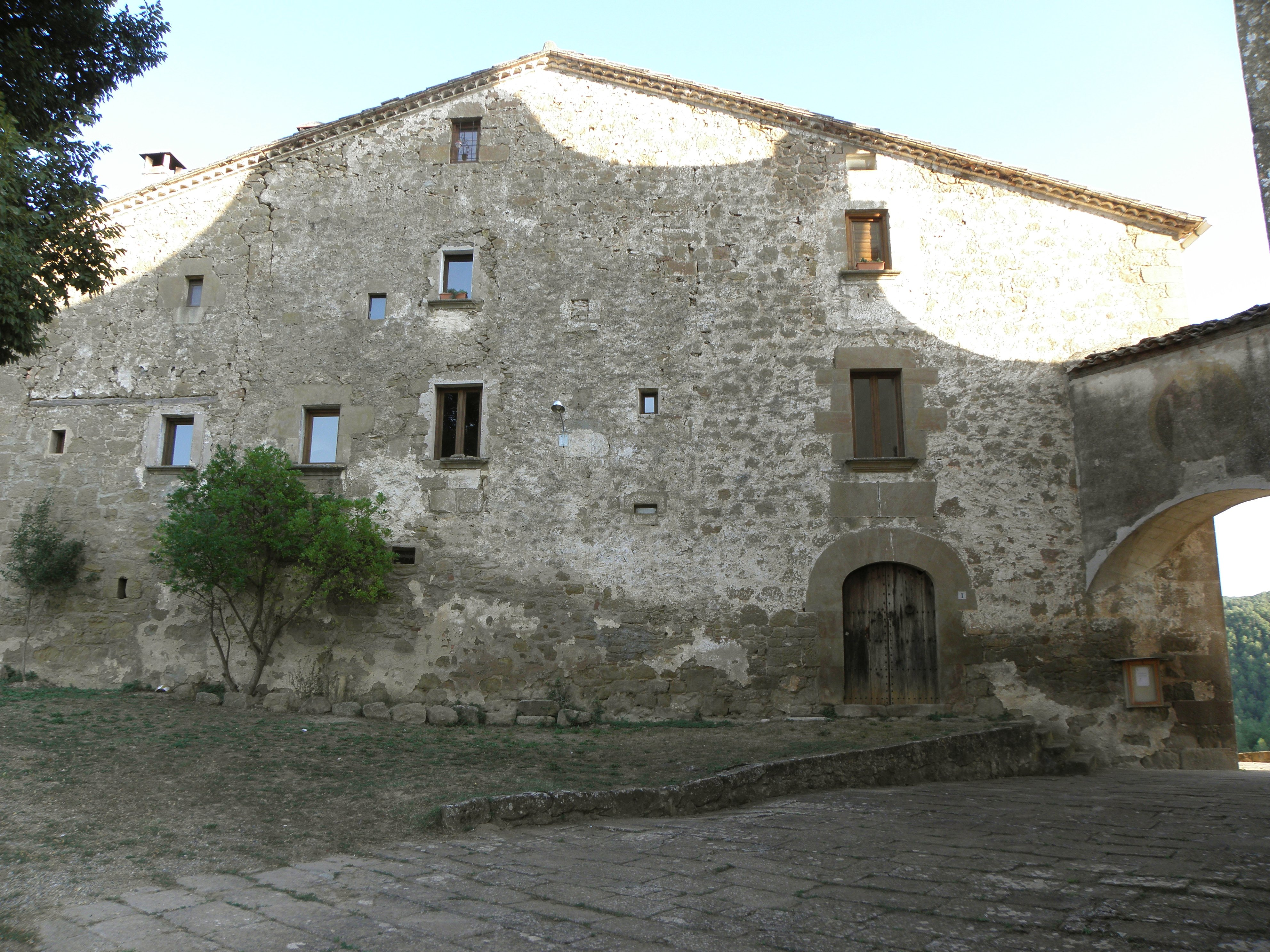 La façana nord-occidental de la rectoria de Madrona (Pinell de Solsonès). A la dreta, el pont que comunica la rectoria amb la nova església.